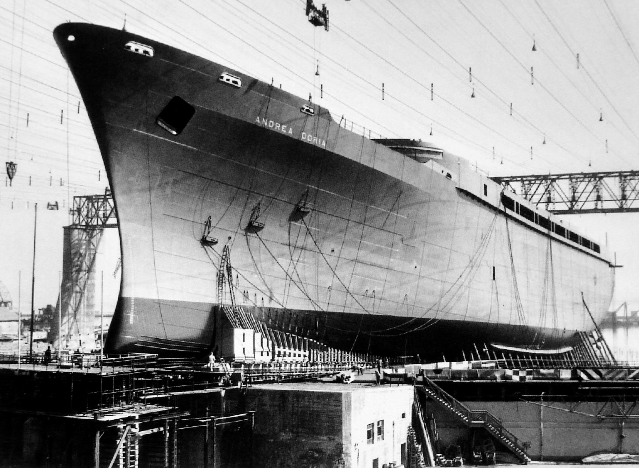 Lo scafo dell'Andrea Doria libero dai ponteggi con la nave che si prepara al varo. Collezione A.C.